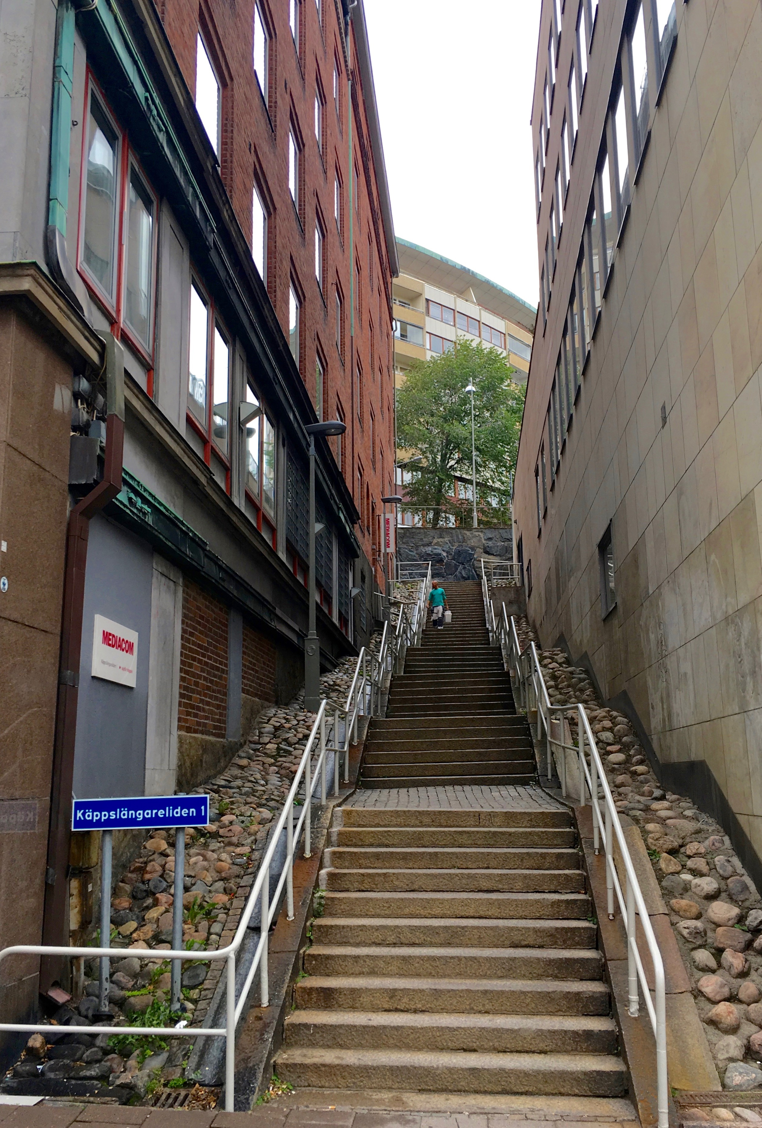 Käppslängareliden är en trappgata, som går från Kungsgatan upp till Otterhällegatan på Otterhällan i centrala Göteborg.